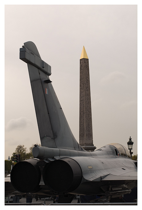 Prise de vue lors du Centenaire du GIFAS à Paris Place de la Concorde Rafale B 01